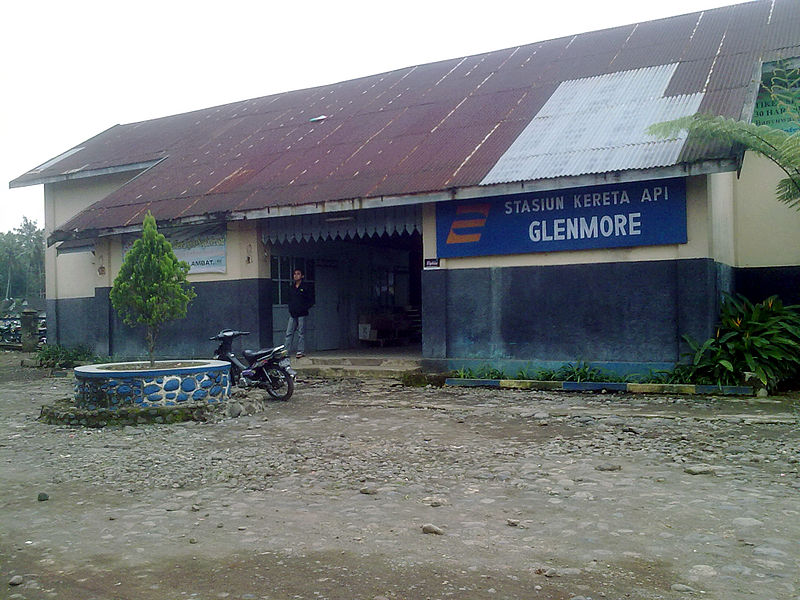 Glenmore Station in Banyuwangi Regency, East Java Province, Indonesia